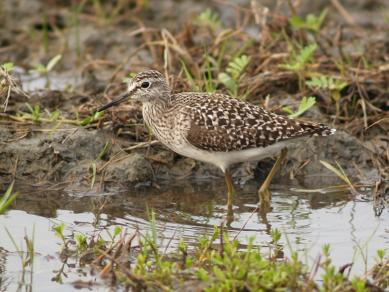 Tringa glareola 鷹斑鷸